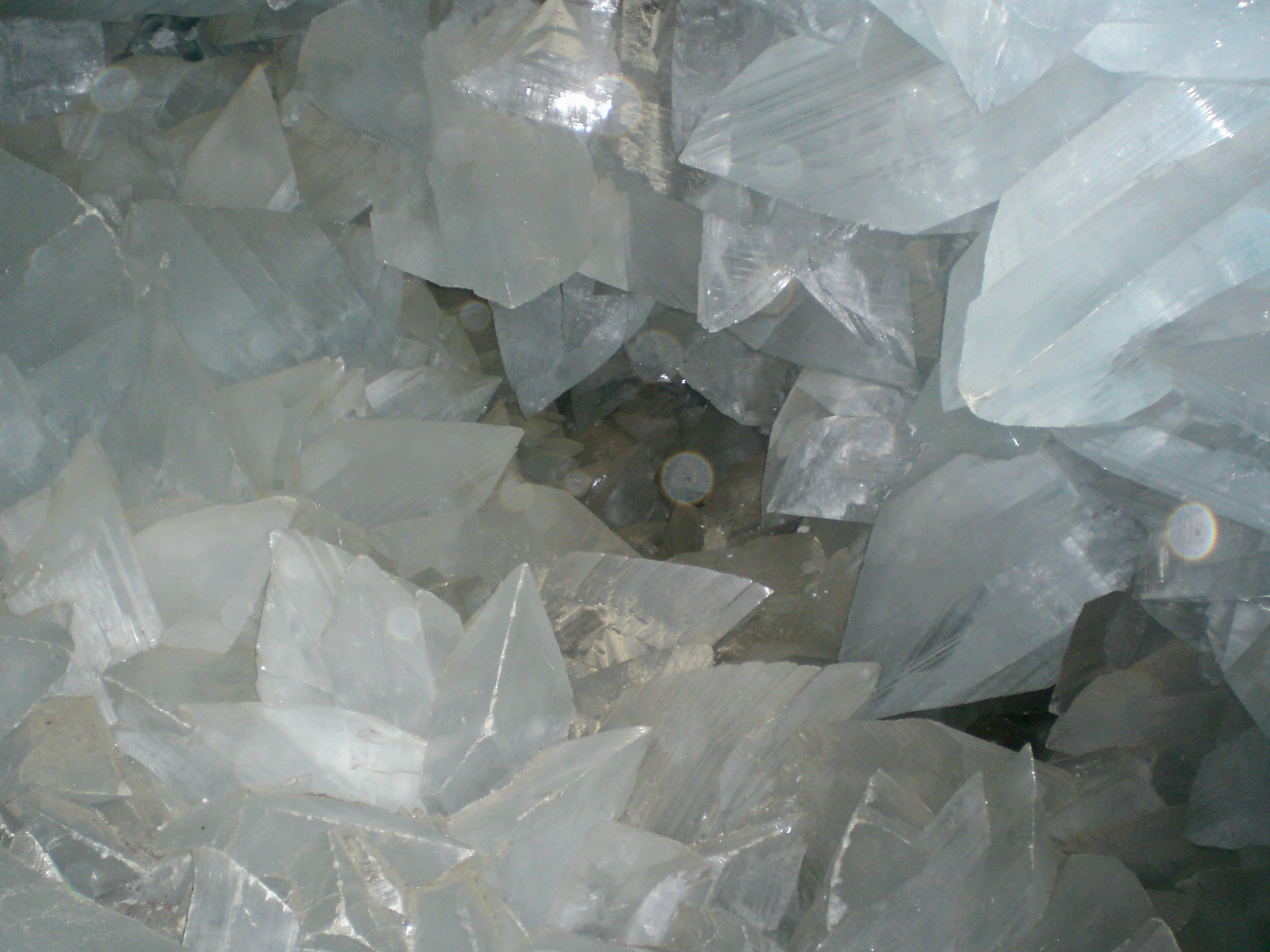 Imagen del Interior de la Geoda de Pulpí